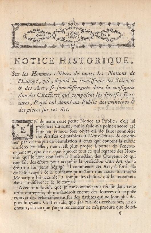 Beginning of the "Notice historique" on writing masters.